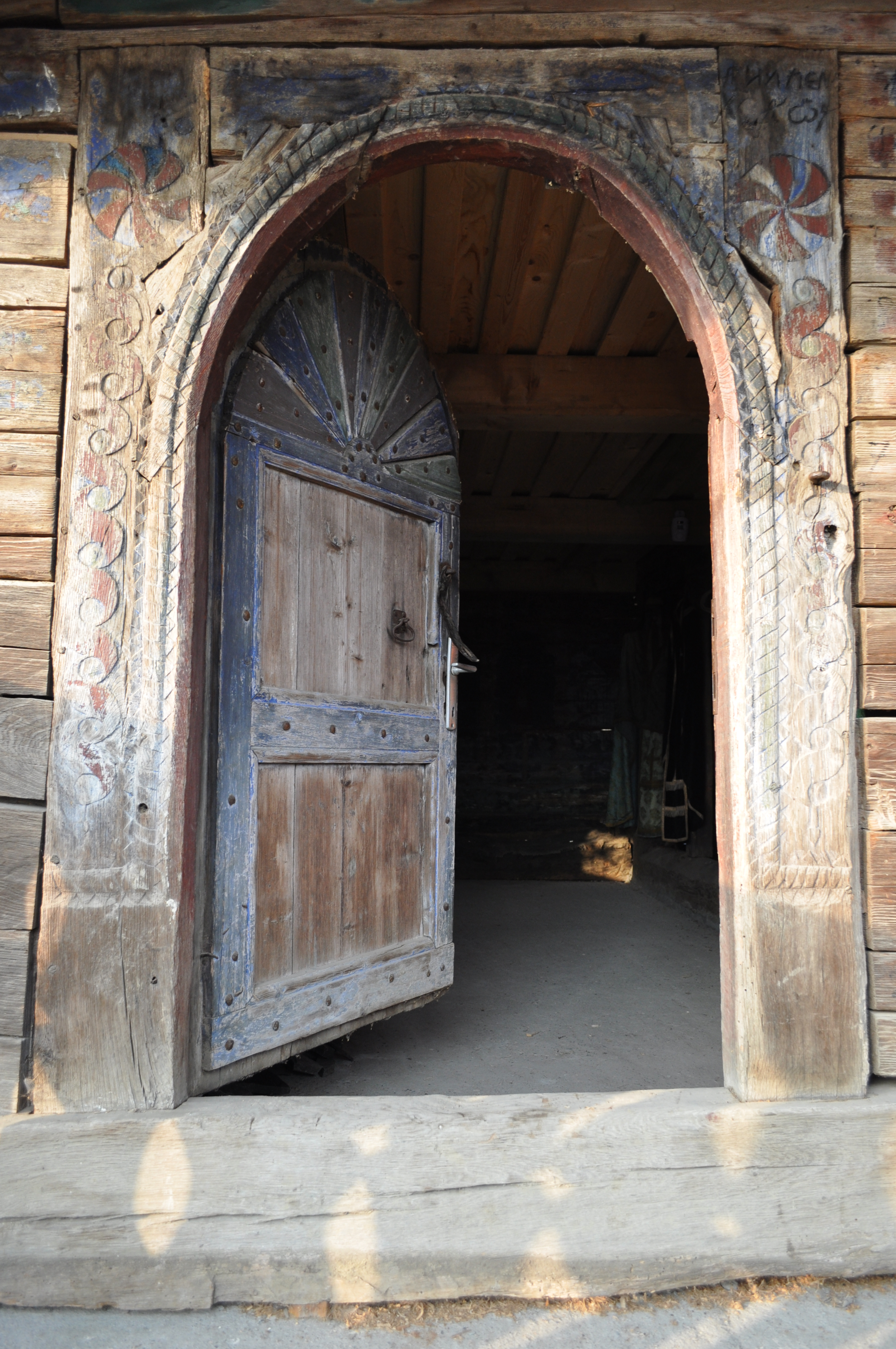 Biserica de lemn "Sfântul Petru" din Mureșenii de Câmpie